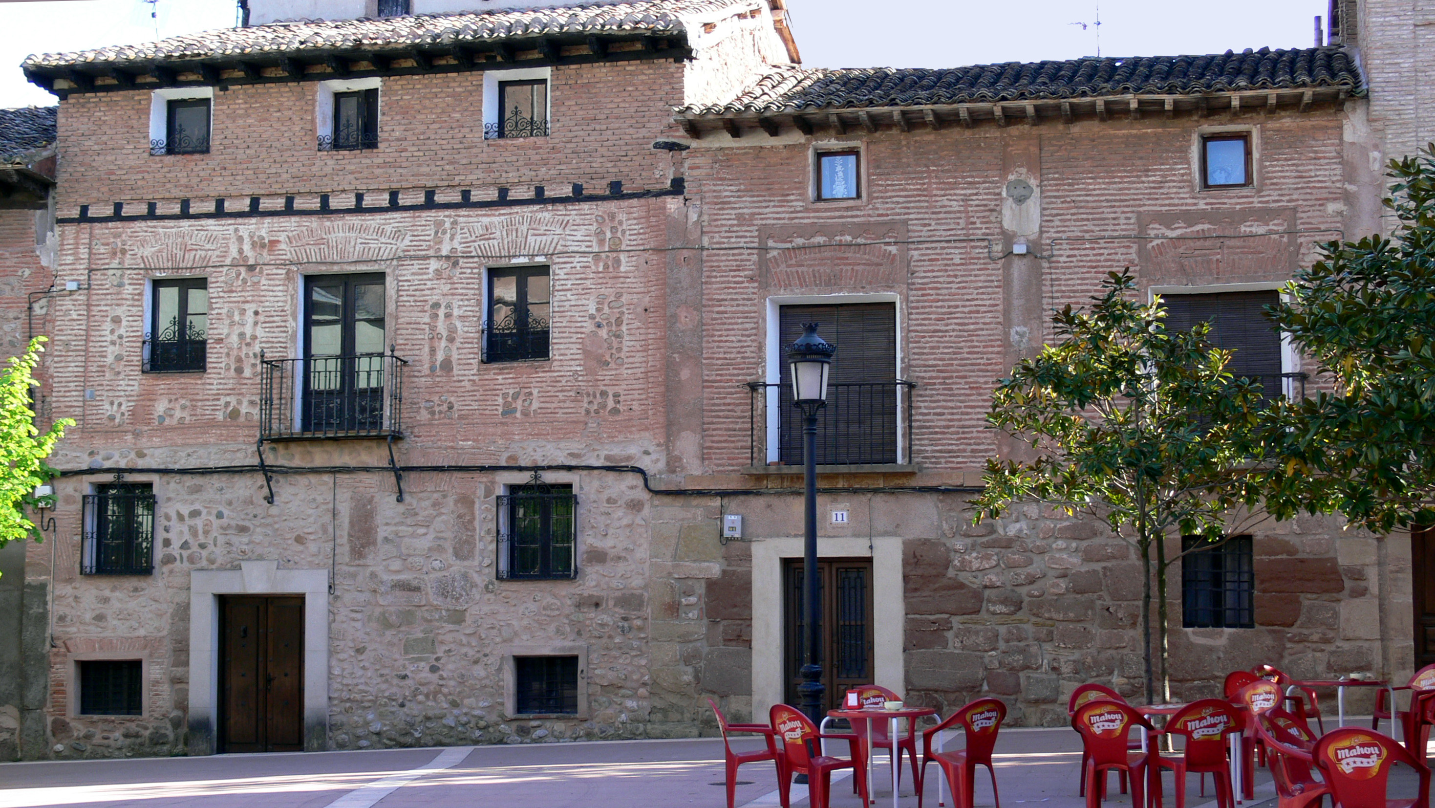 Tricio, municipio de La Rioja (España)